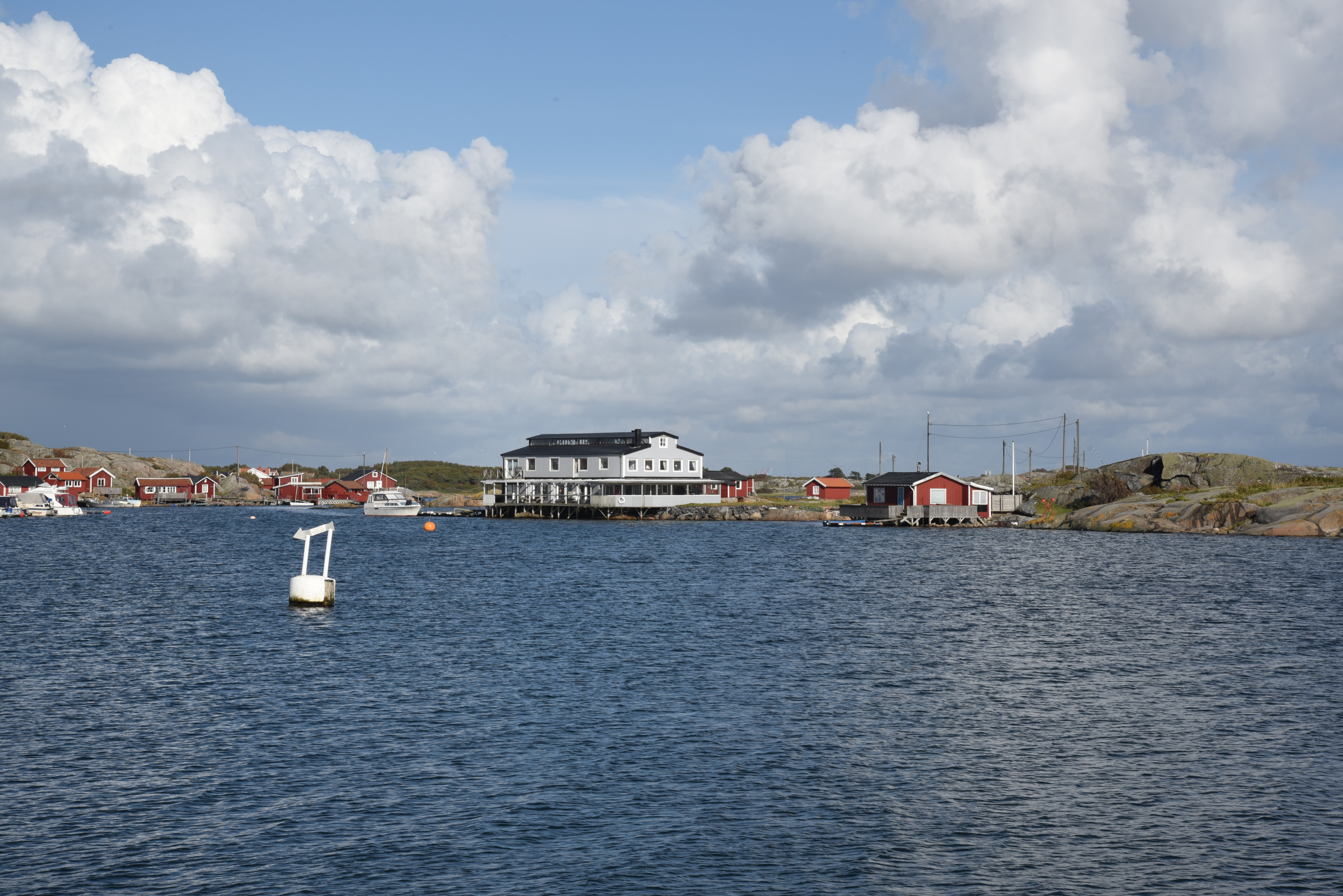 Utsikt mot Långholmen från Hönö Klåva.